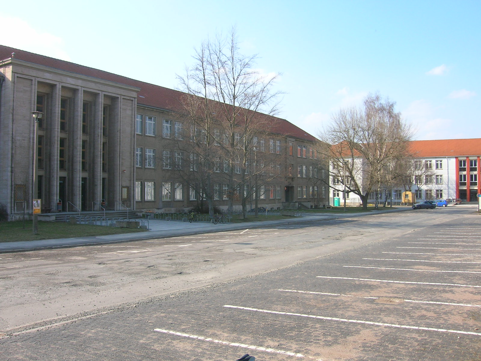 Technische Universität Ilmenau (Thüringen), Helmholtzbau